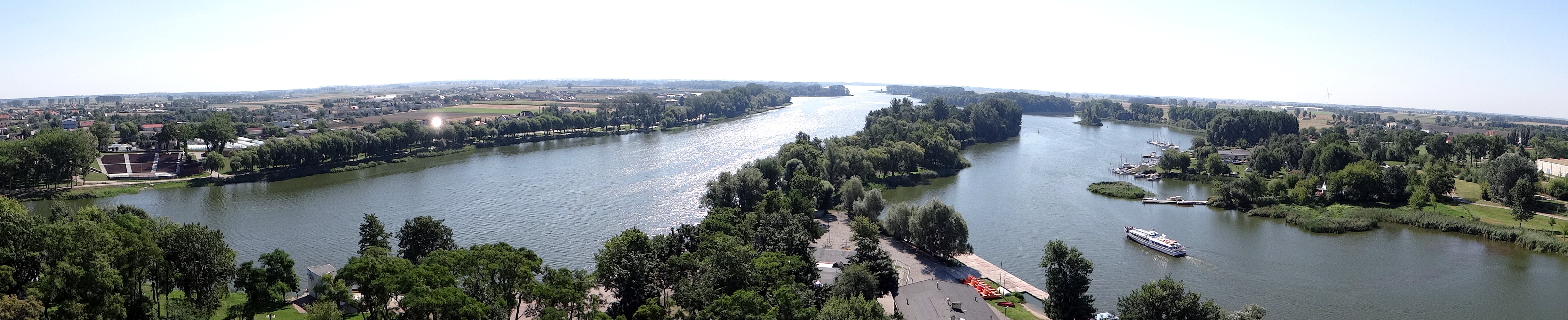 Widok na południową część Gopła z Mysiej Wieży